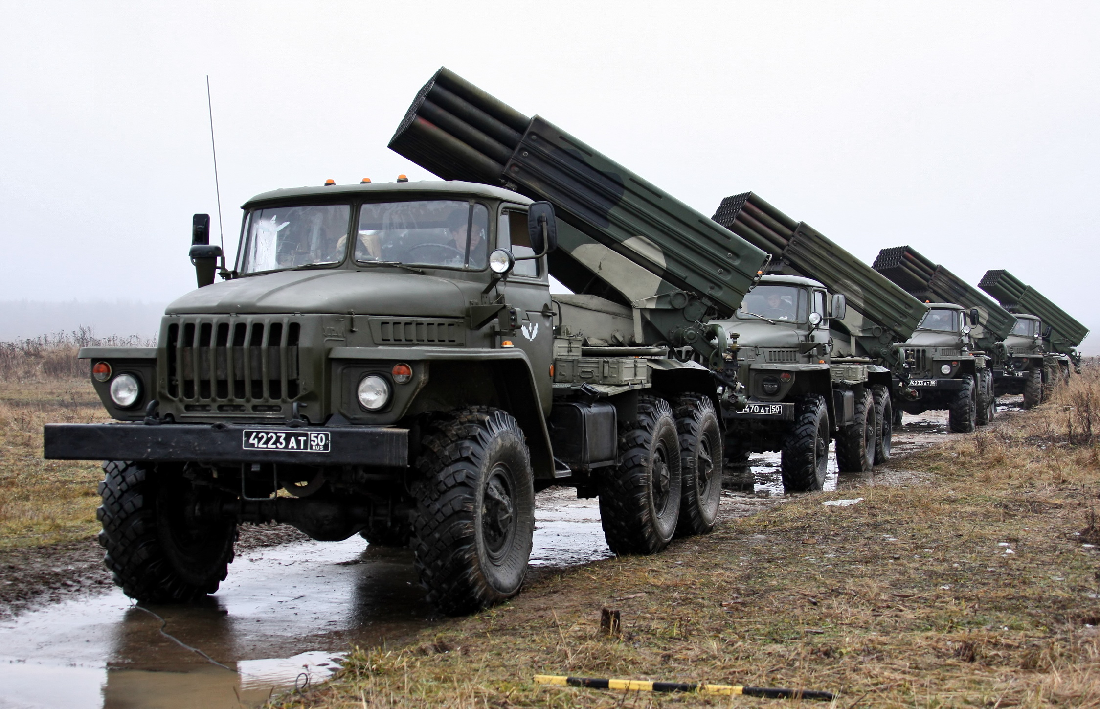 Батарея БМ-21 РСЗО Град из состава реактивного артиллерийского дивизиона бригады (Exercises with BM-21 9K51 Grad MLRS battery)